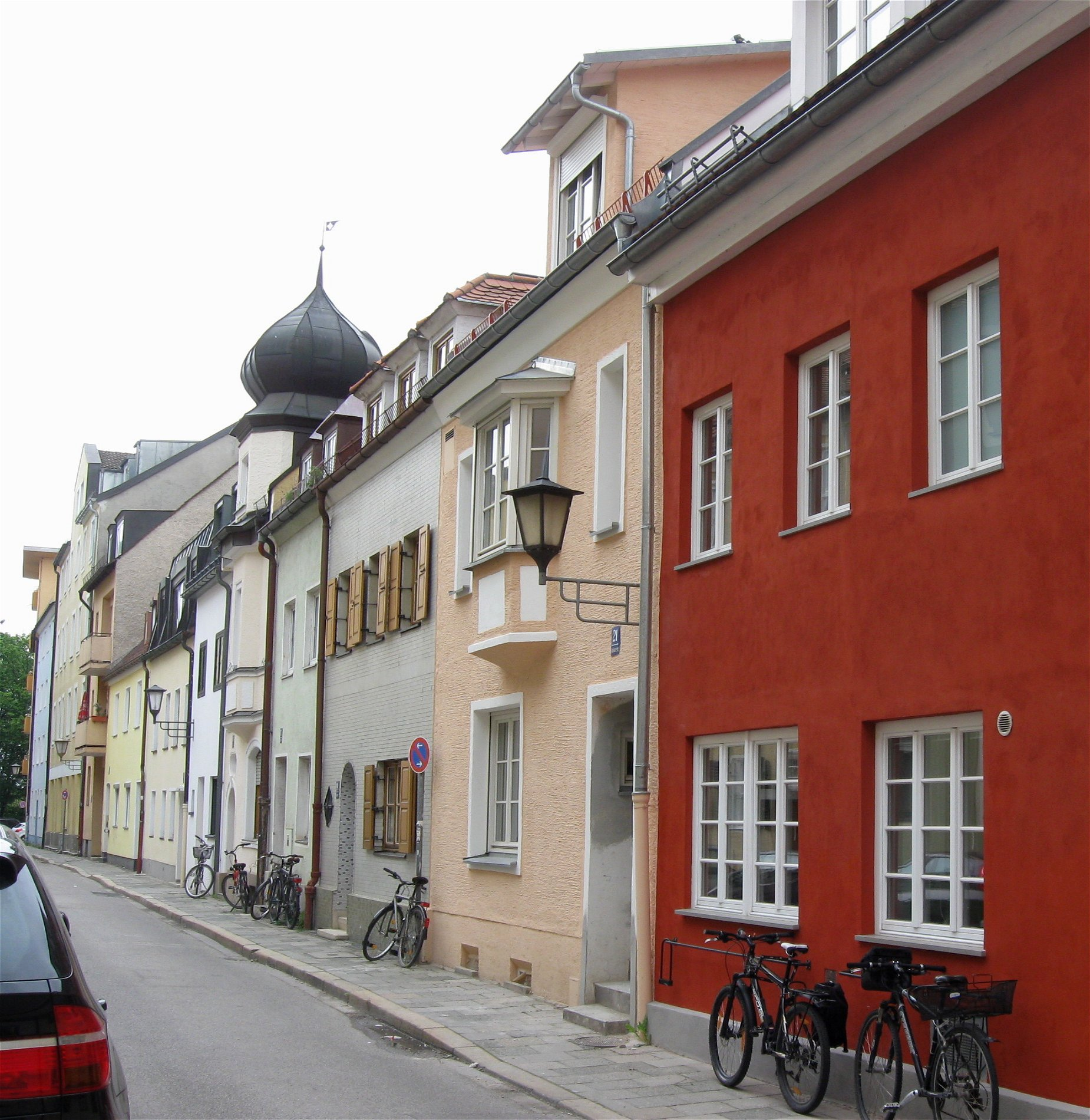 Ackerstraße in München-Au